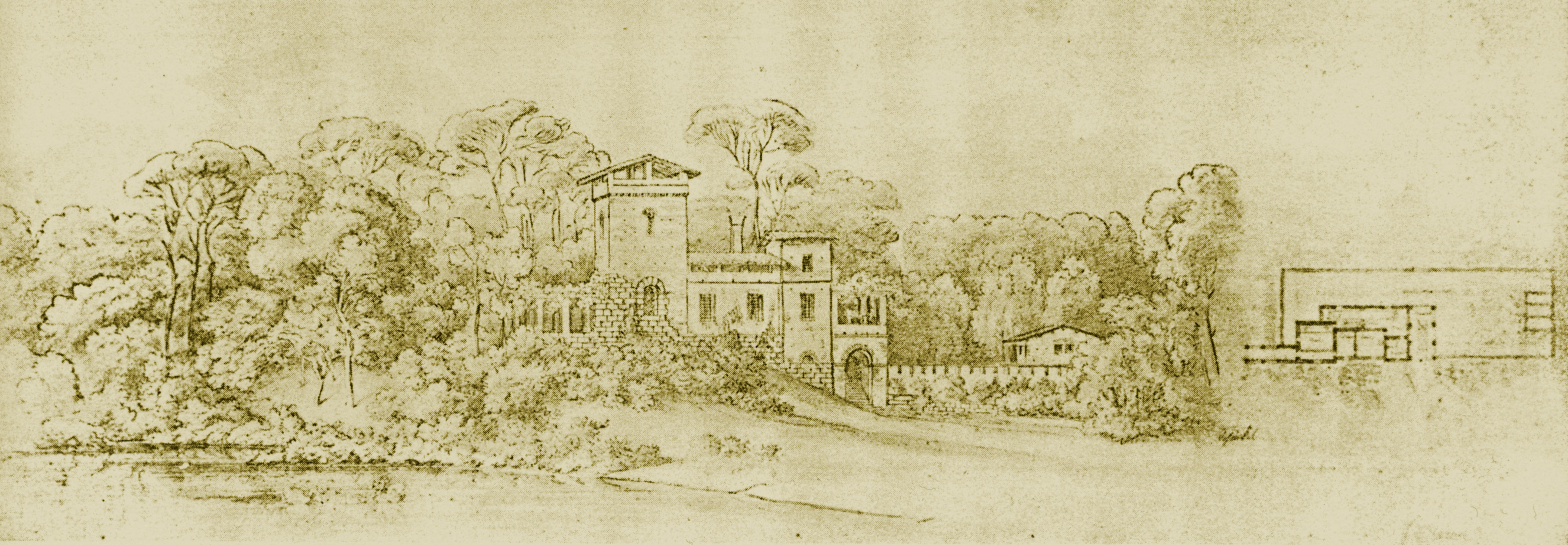 Entwurf zu einem Hofbedientenhaus, vielleicht für Glienicke (Zeichnung von Schinkel, undatiert, um 1830)